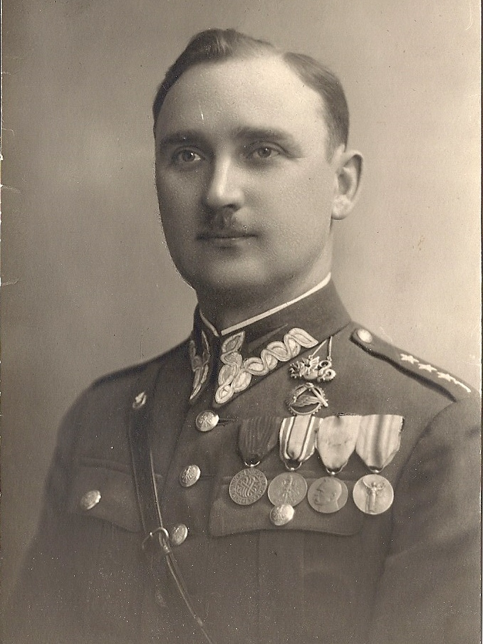 kpt. Stanisław Szostak - oficer 1 pułku czolgow